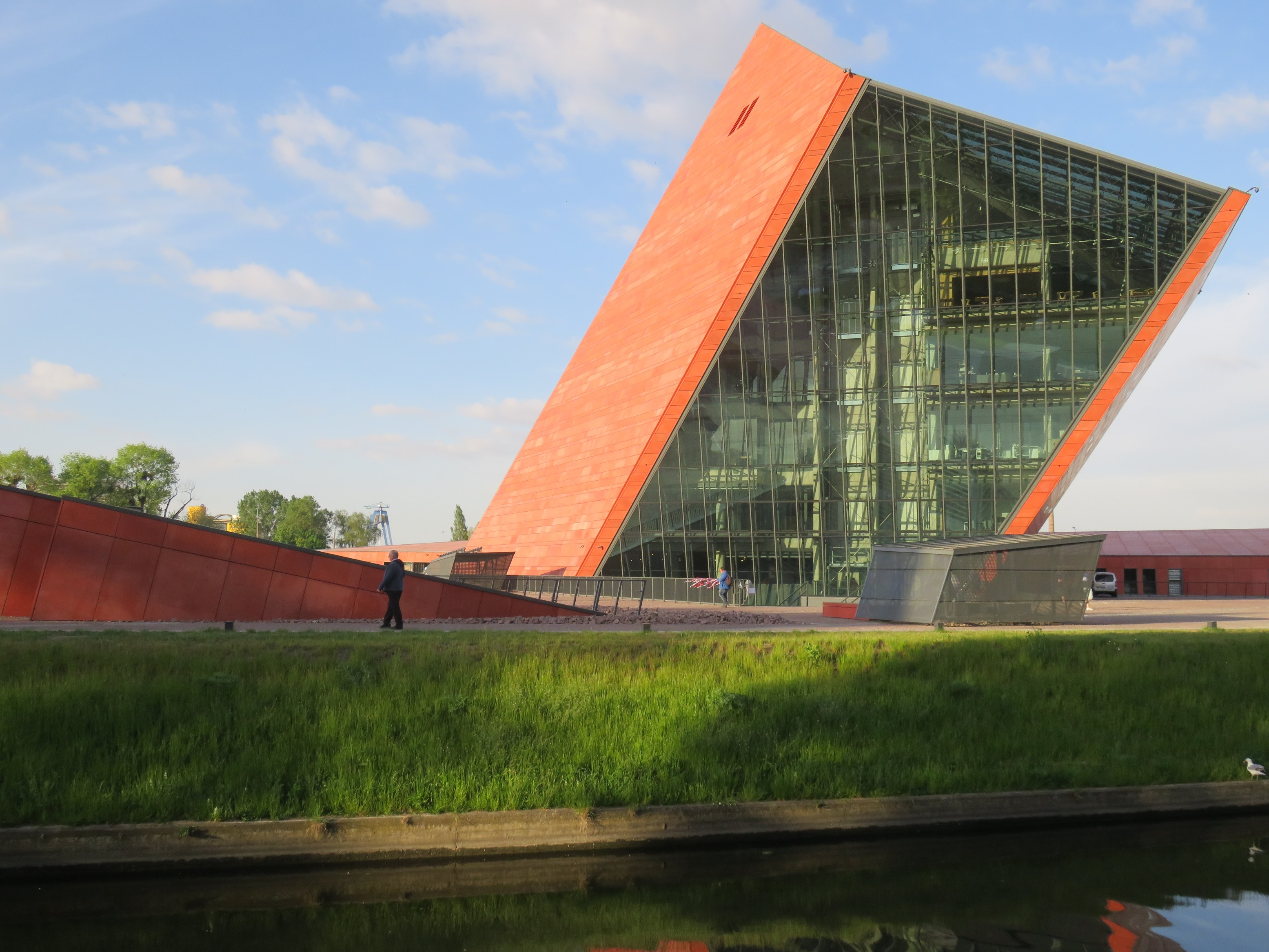 Das Museum des Zweiten Weltkriegs (Muzeum II Wojny Światowej) in Danzig.